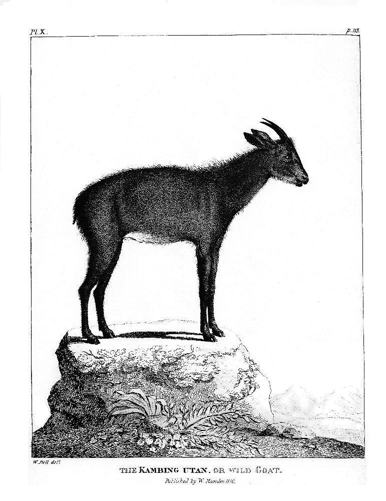 Kambing Utan